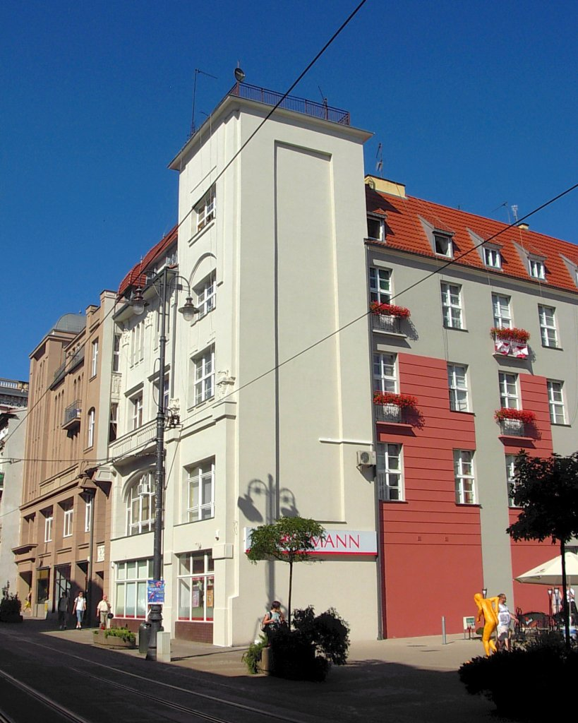 Kamienica ul. Gdańska 10 w Bydgoszczy